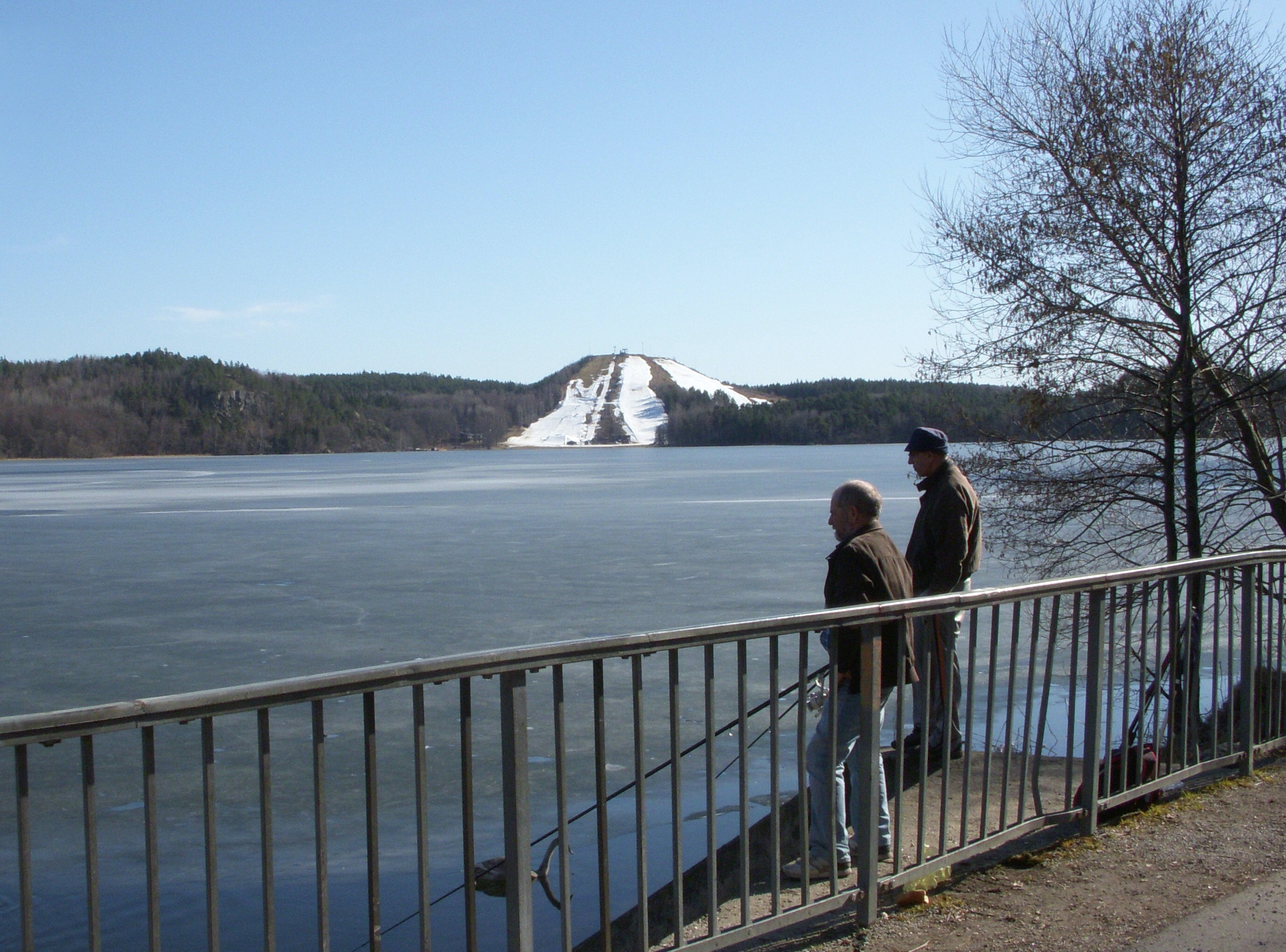 Albysjön med Flottsbrobacken i bakgrunden